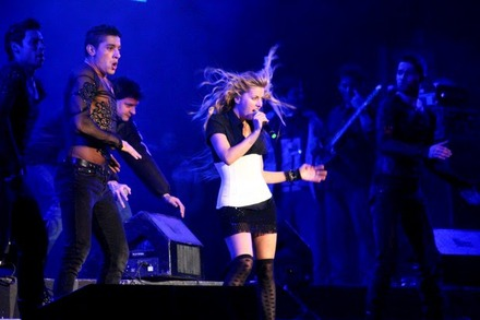 Catalina Palacios, cantante chilena, en vivo durante uno de sus conciertos de 2012.